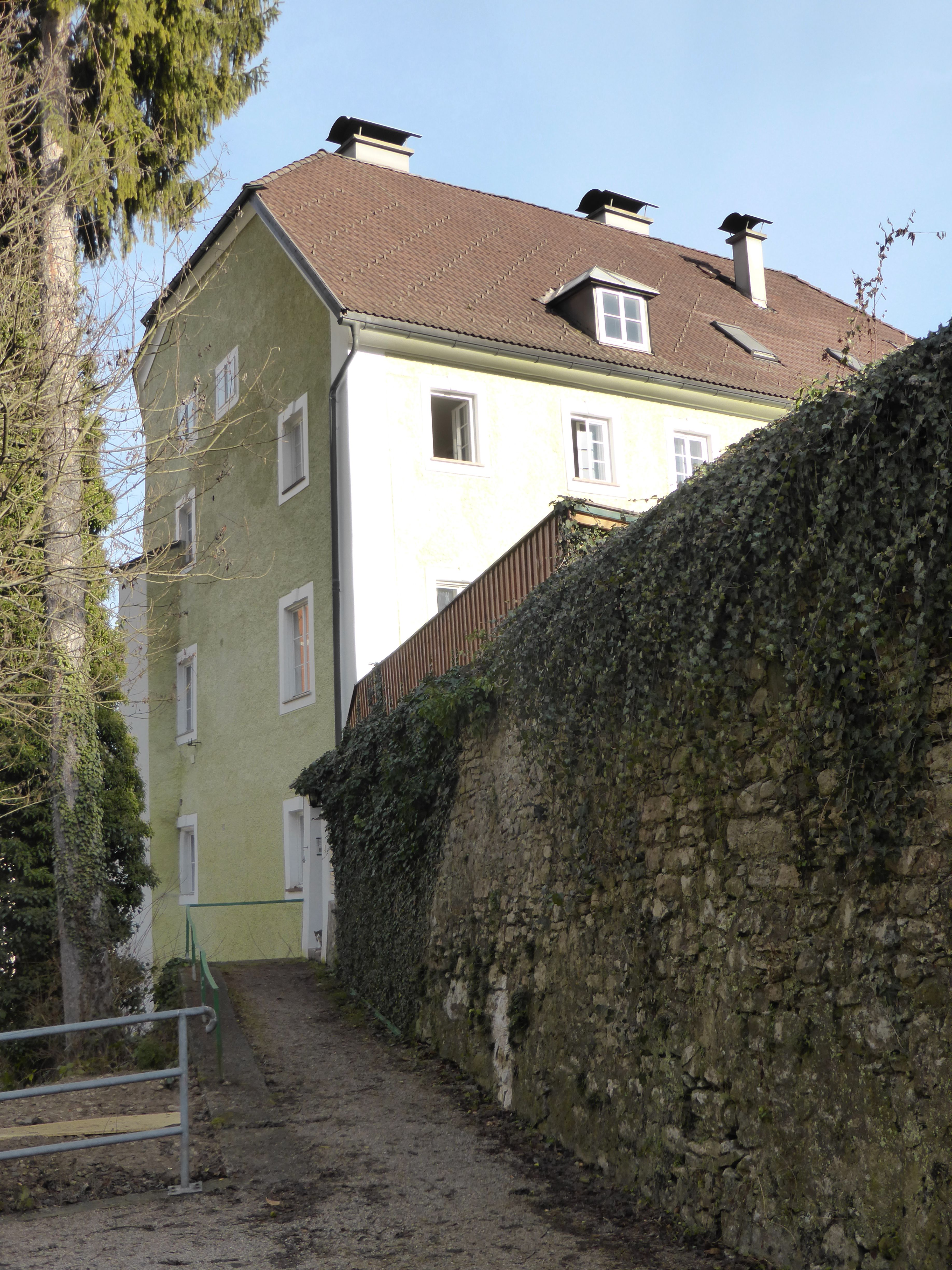 Wimmer-Schlössl